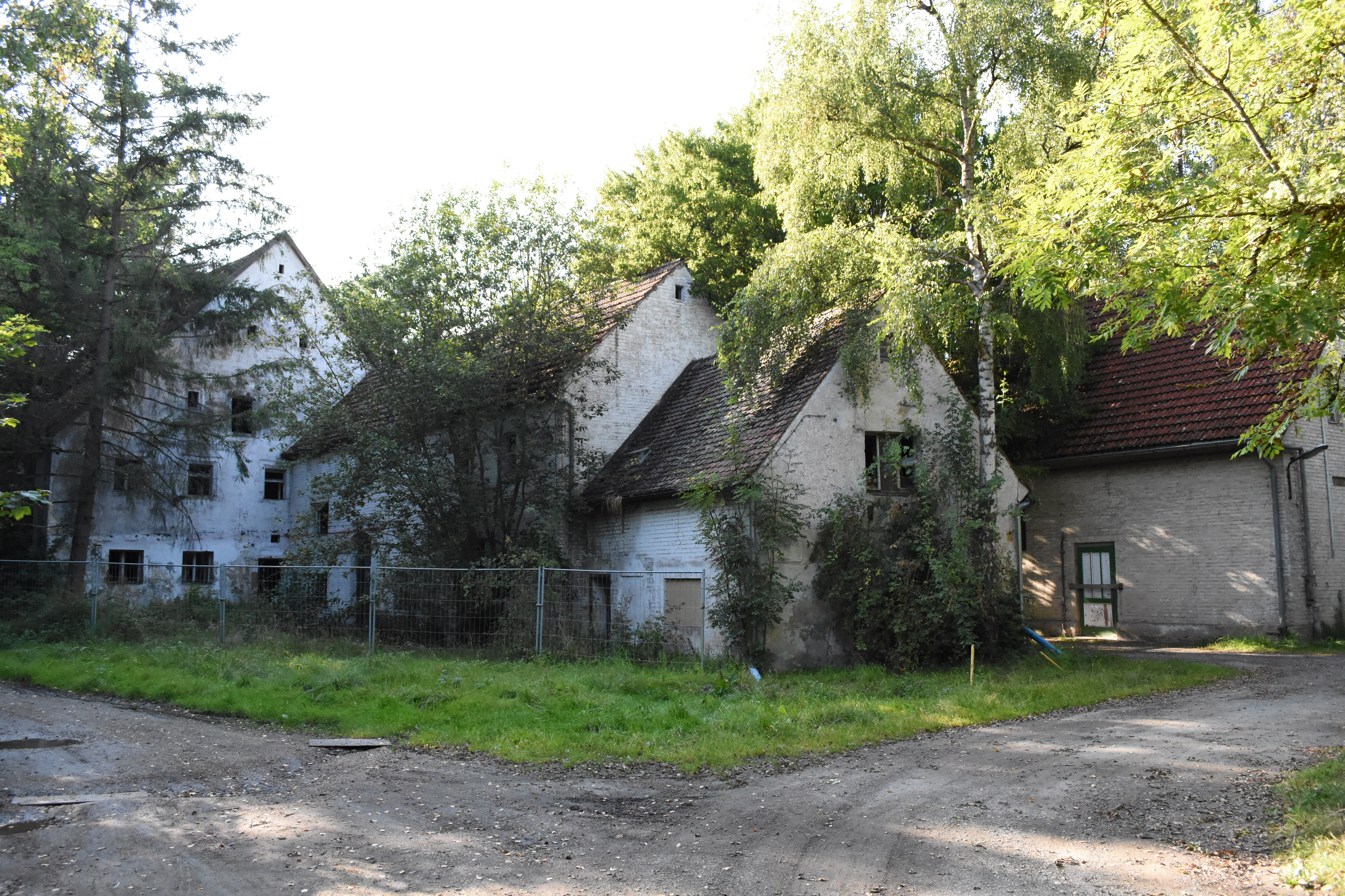 Rosenberg, Spitzermühlweg 2: Ehemalige Mühle, sog. Spitzermühle, „1786“, im Kern älterThis is a photograph of an architectural monument.